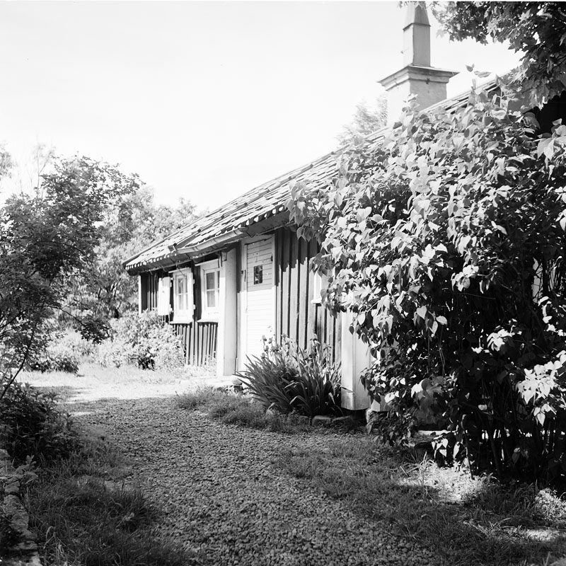 Soldattorpet Bussenhus i Spånga socken